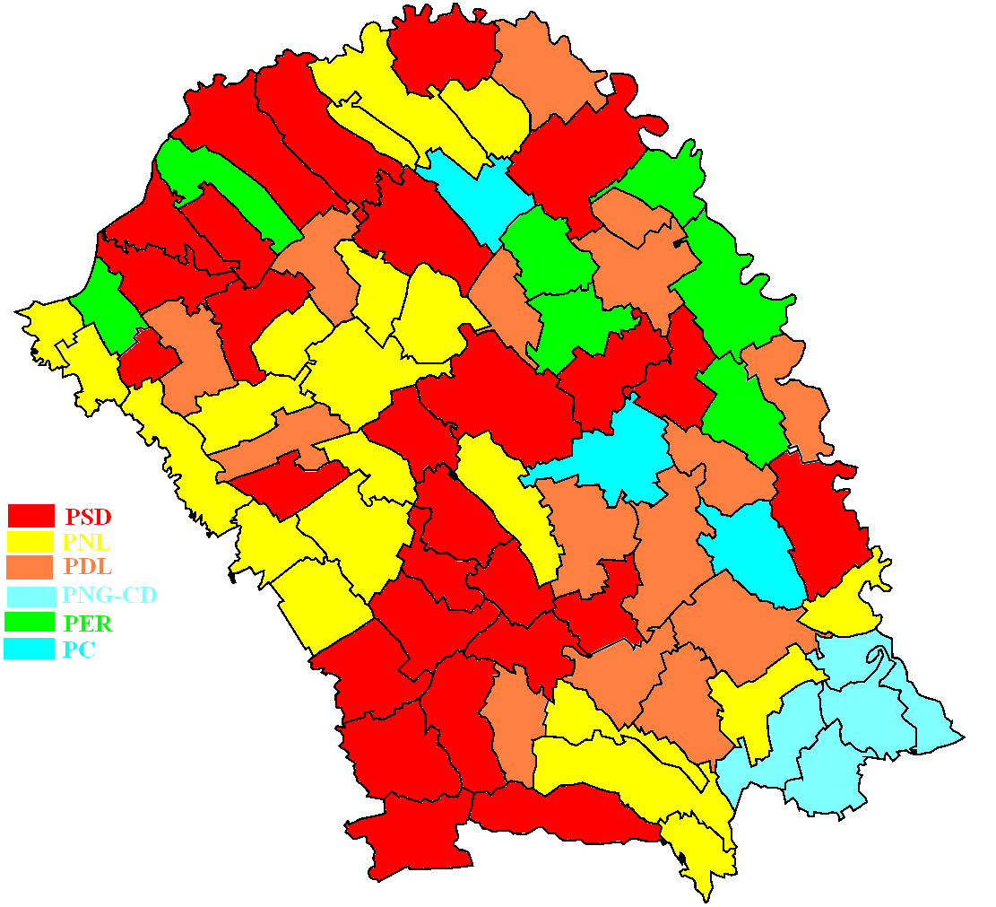 Harta politica Botosani